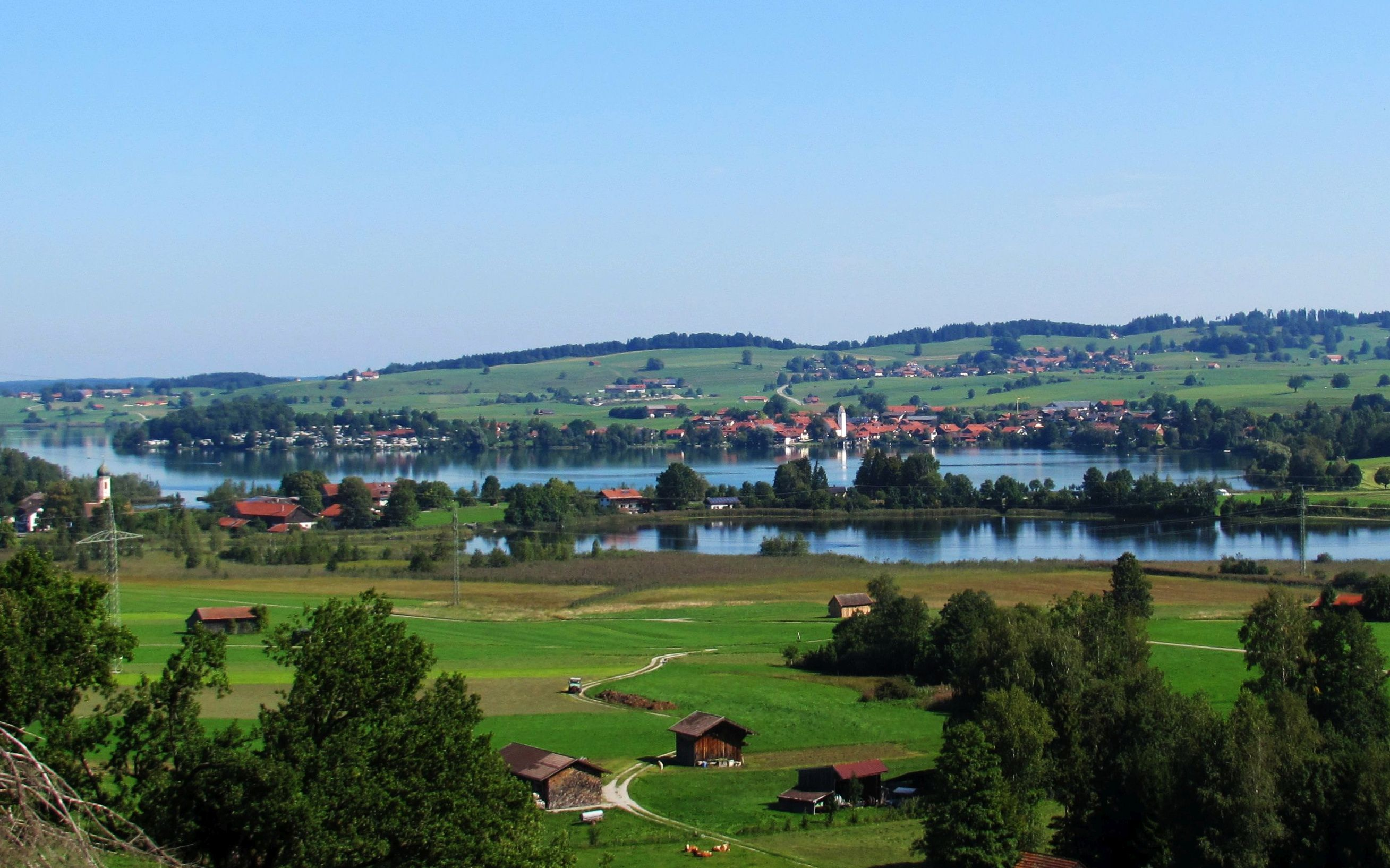 Blick auf den Riegsee mit dem Ort Riegsee und Aidling dahinter, Leibersberg links im Hintergrund. Vorne der Froschhauser See